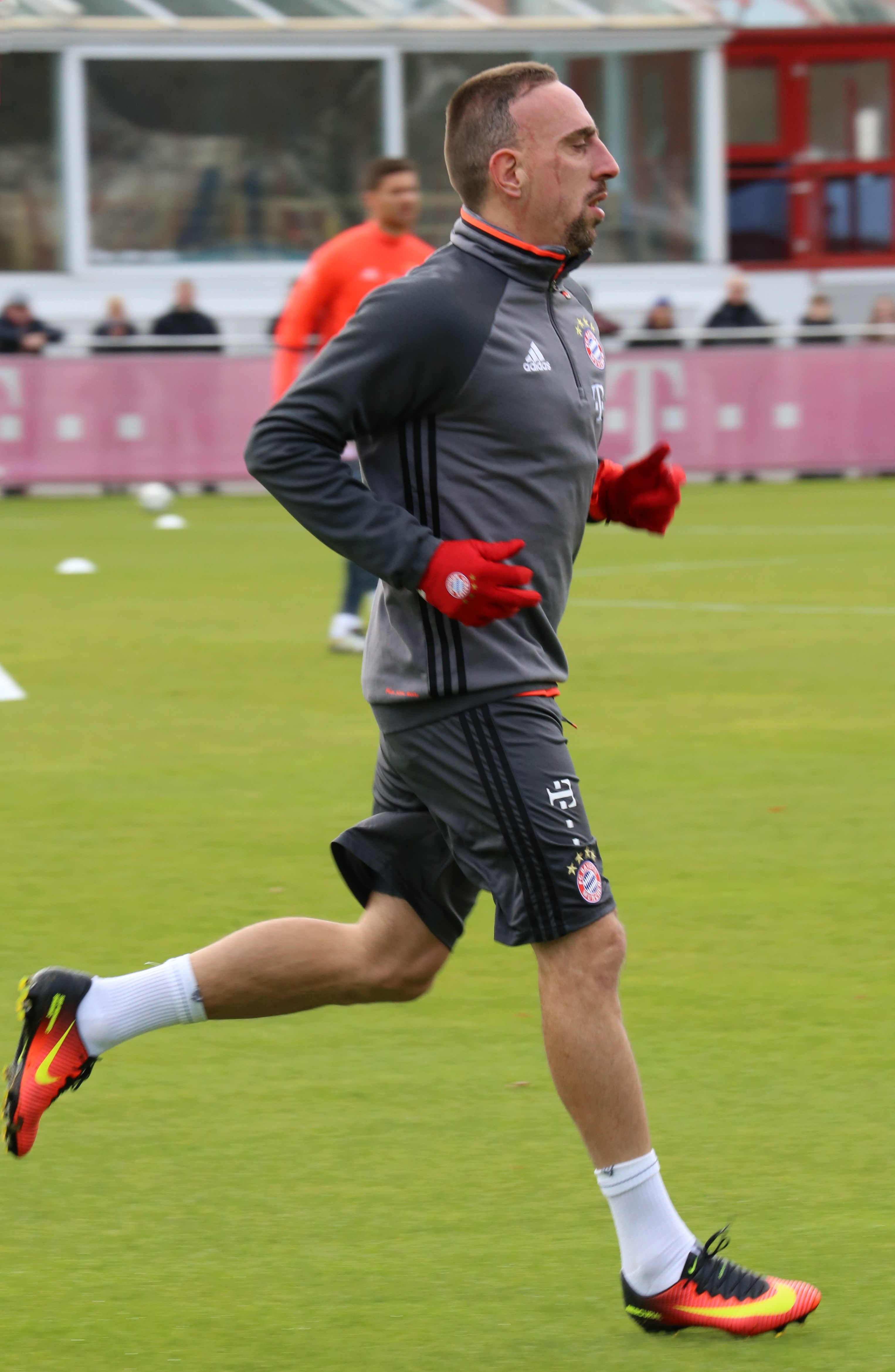 Franck Ribéry beim Training auf dem Gelände des FC Bayern München (November 2016)